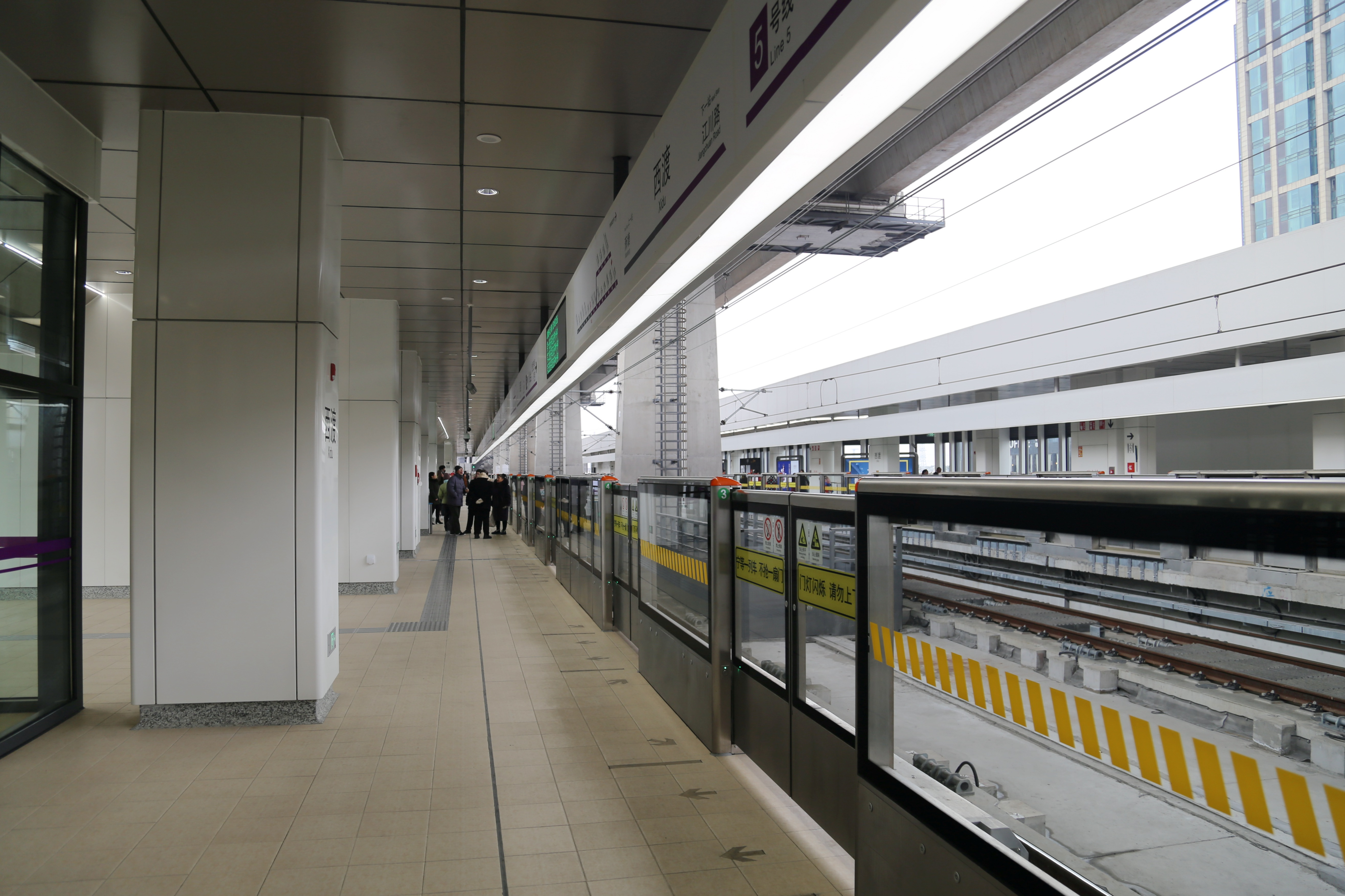 西渡站站台